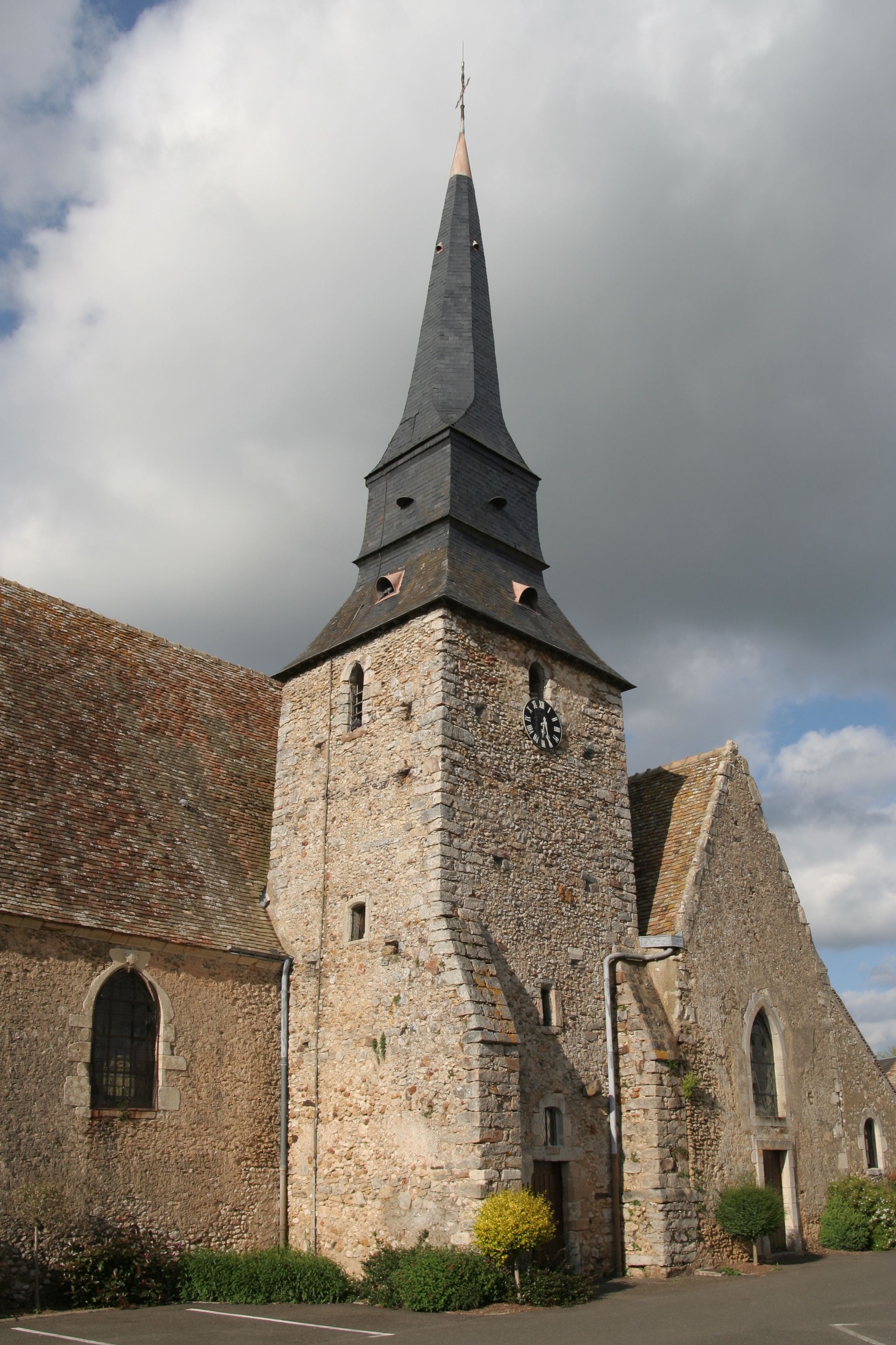 Église Saint-Pierre du Breil-sur-Mérize.